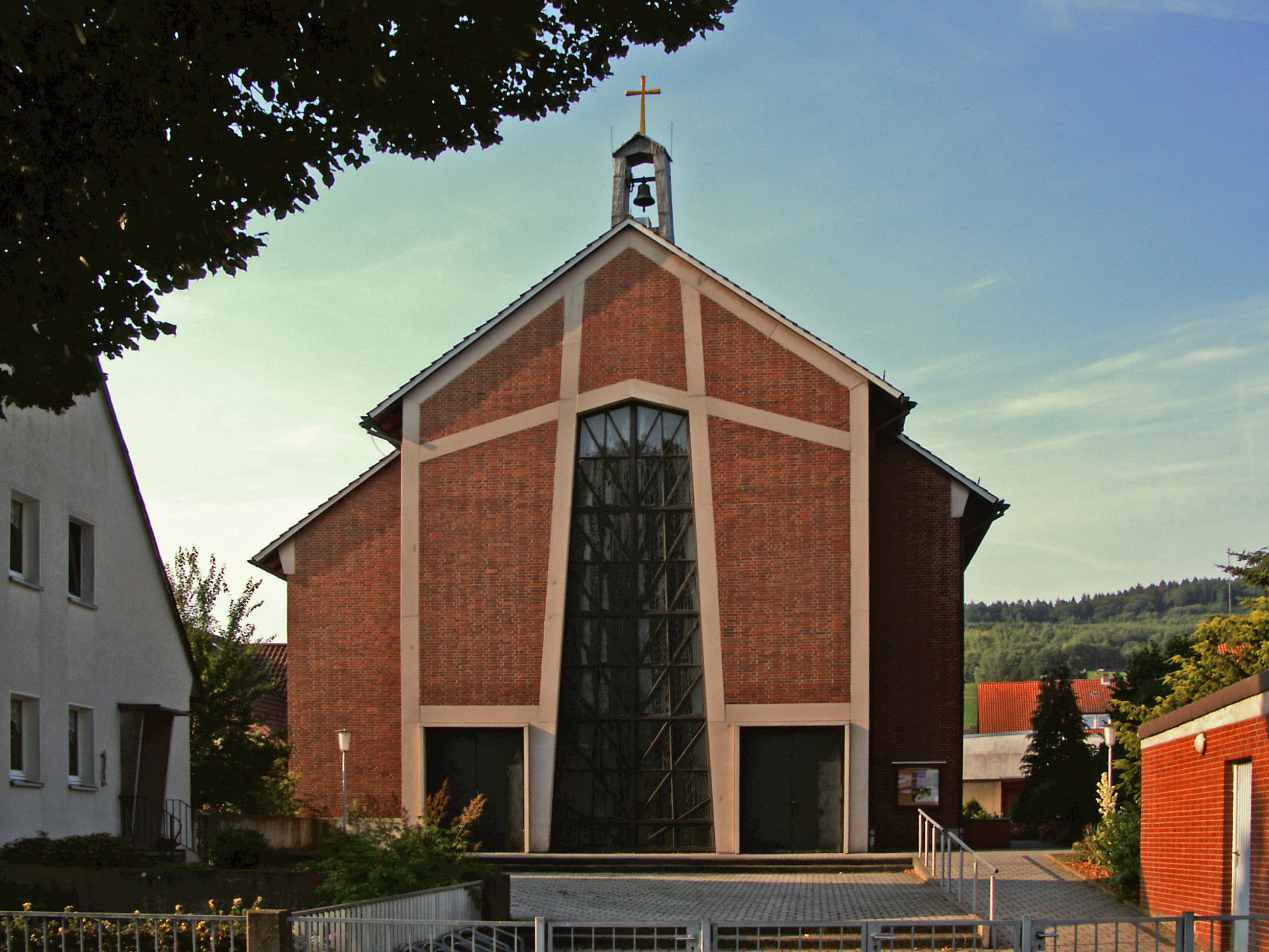 Katholische Kirche St. Joseph in Delligsen, Vorderseite